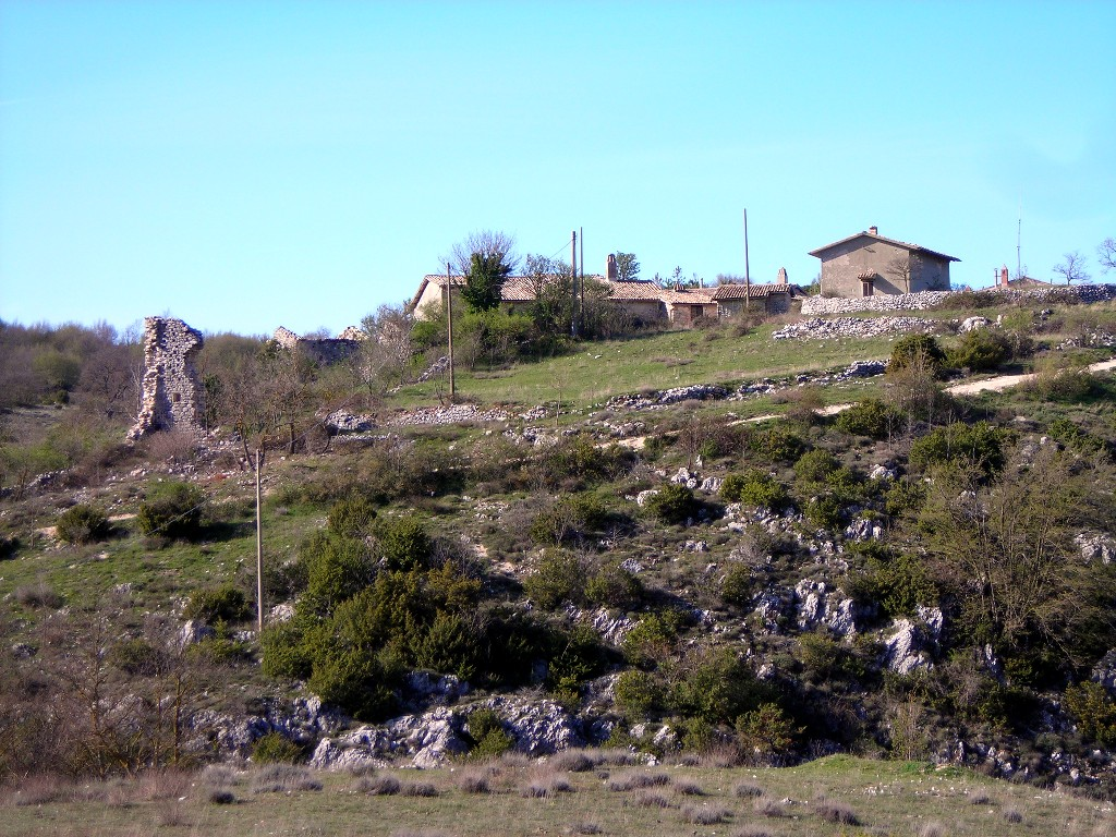 ruins of Cascito, Cancelli, Foligno, Perugia, Umbria, Italy